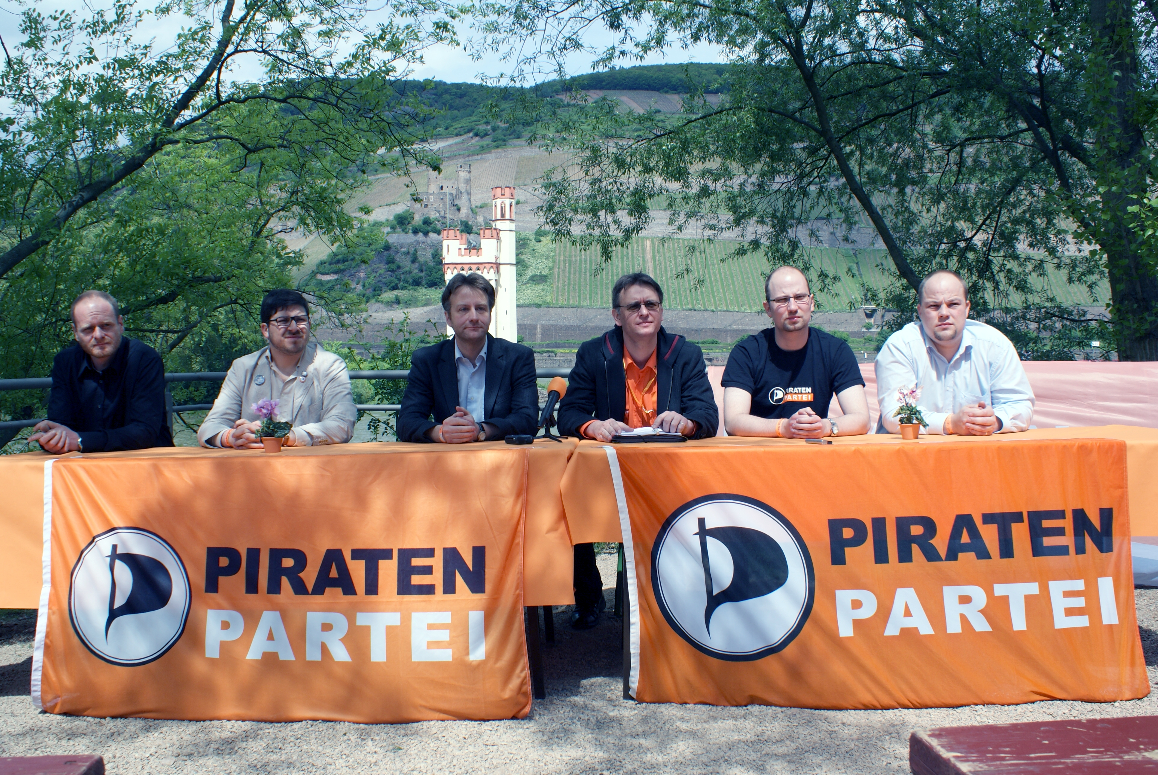 Vorstand 2010/2011 der Piratenpartei Deutschland bei einer Pressekonferenz auf dem Bundesparteitag in Bingen, von links nach rechts: Bernd Schlömer, Christopher Lauer, Jens Seipenbusch, ein Basismitglied, Andreas Popp, Benjamin Stöcker, es fehlen Daniel Flachshaar und Wolfgang Dudda. Im Hintergrund ist der Mäuseturm.